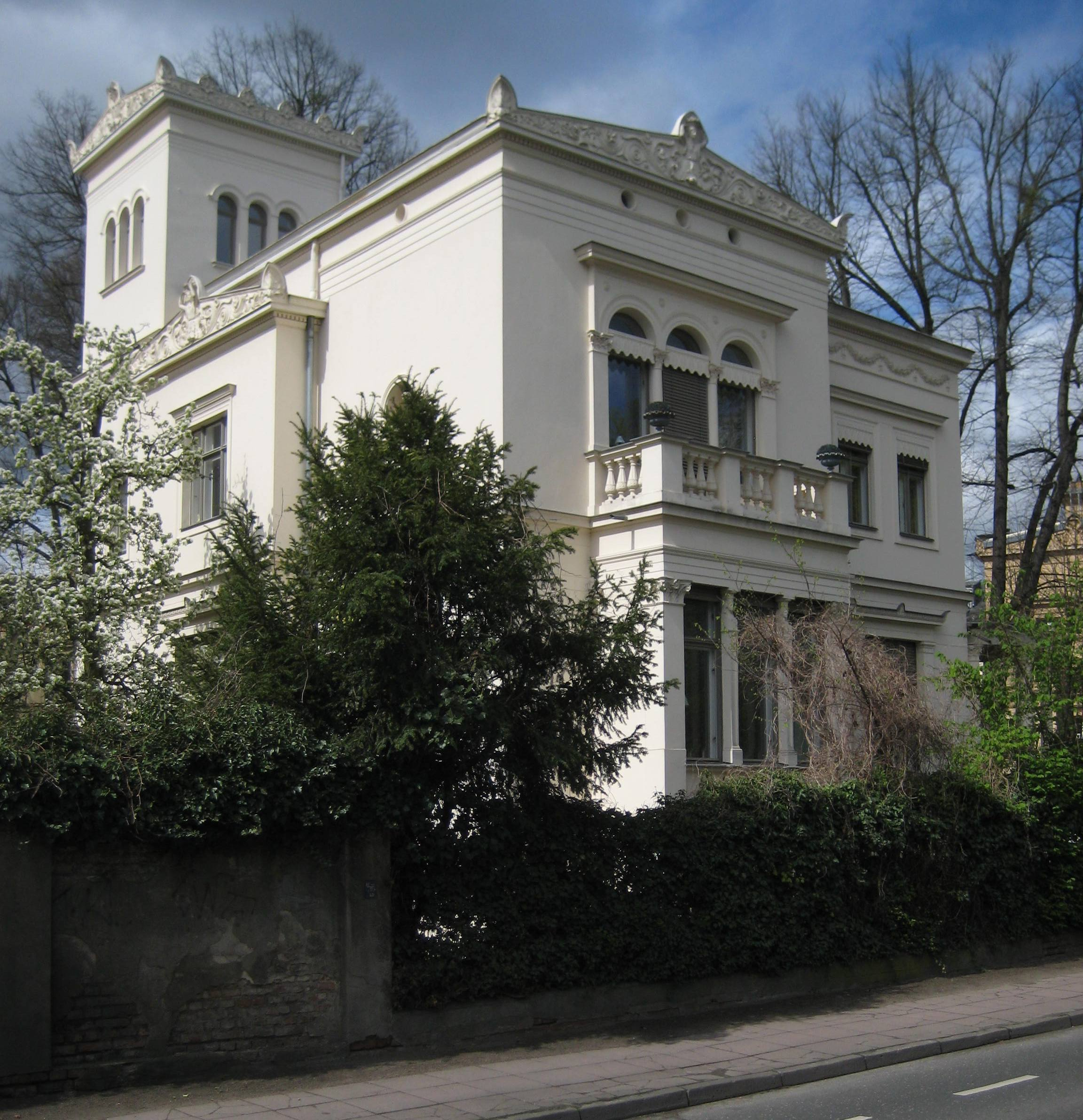 Denkmalgeschützte Villa Am Neuen Garten 7 in Potsdam.